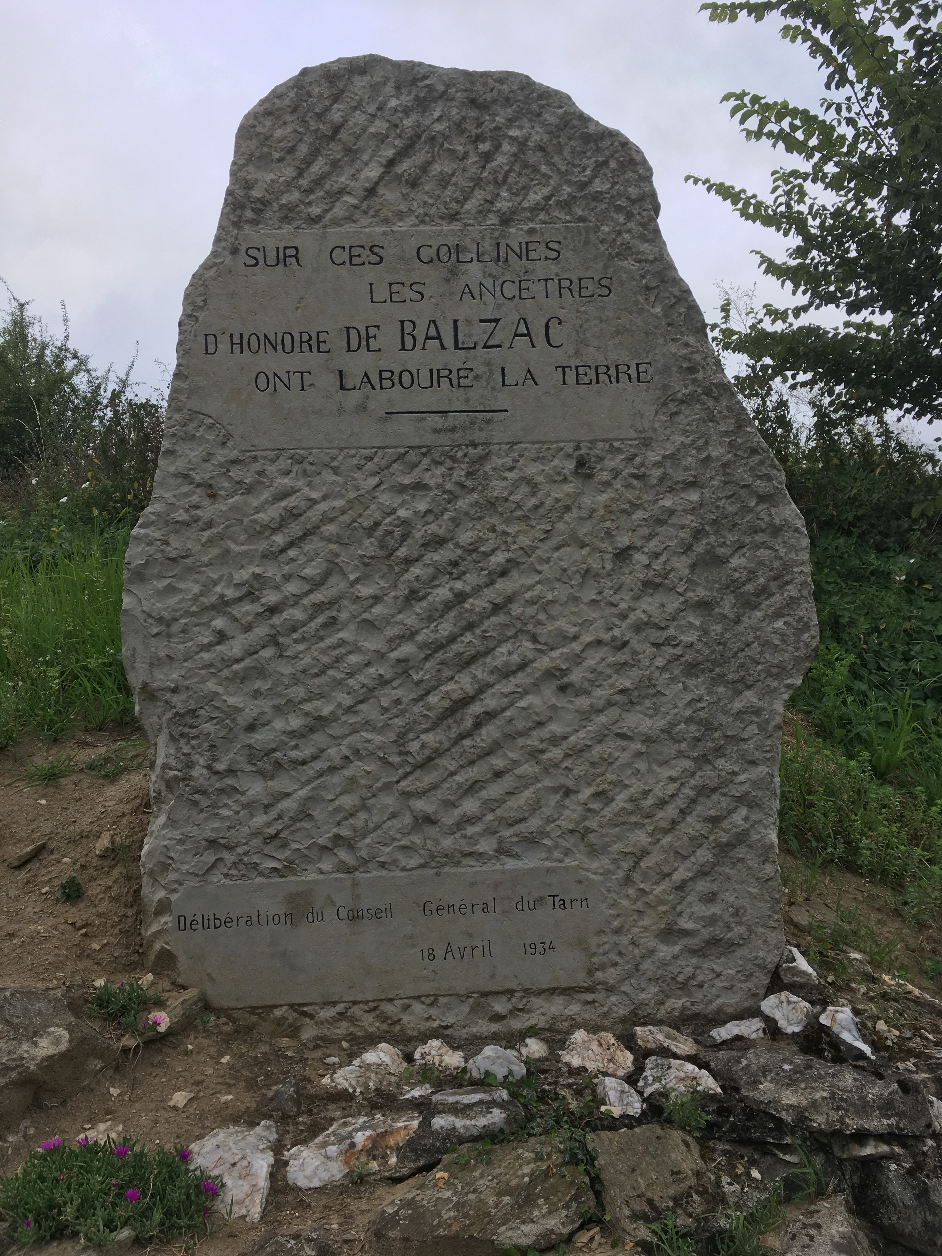 Hommage aux ancêtres d'Honoré de Balzac - Montirat